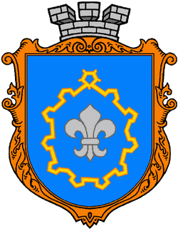 Brody COA, Lviv region, Ukraine Броди - у синьому полі срібна квітка лілеї, оточена золотим контуром міських укріплень. Затверджений 1997 р. Автор - А.Гречило.